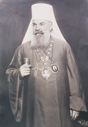 Патриарх Сербский Гавриил V